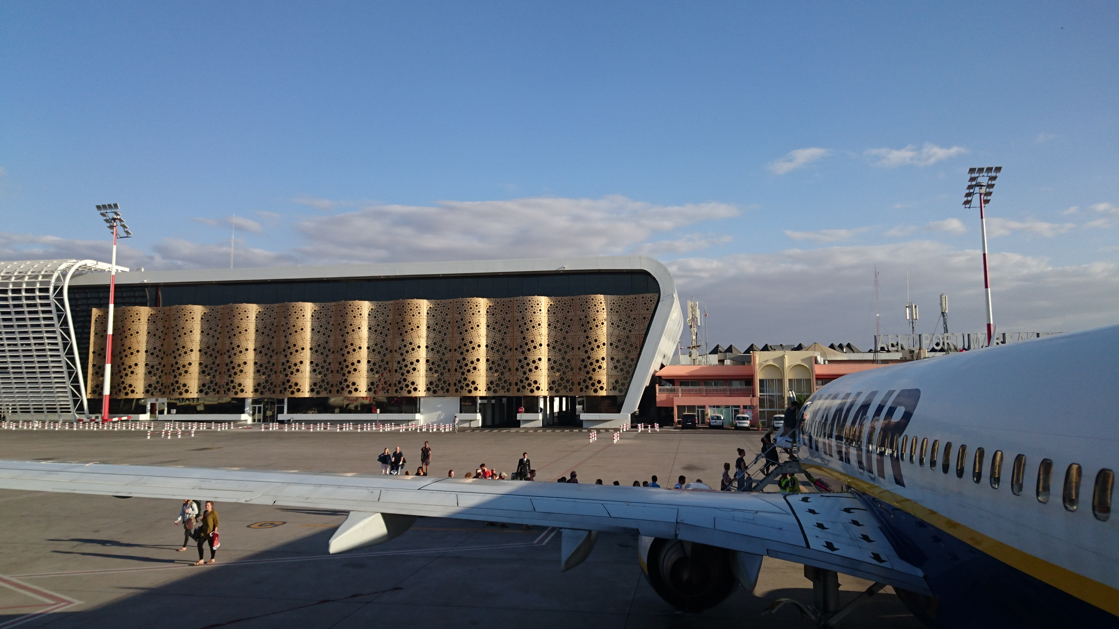 Der Flughafen Marrakesch-Menara befindet sich unweit vom Zentrum Marrakeschs. Im Bild das neue Terminalgebäude.